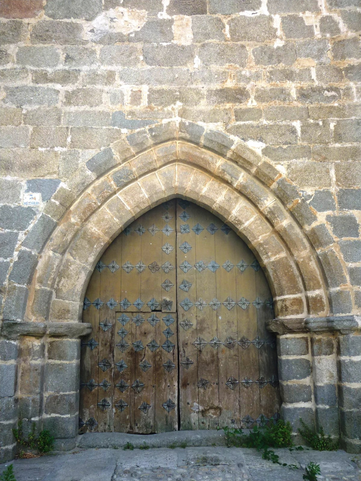 Parroquia de la Asunción de Nuestra Señora, El Barco de Ávila, Ávila, Castilla y León, España.